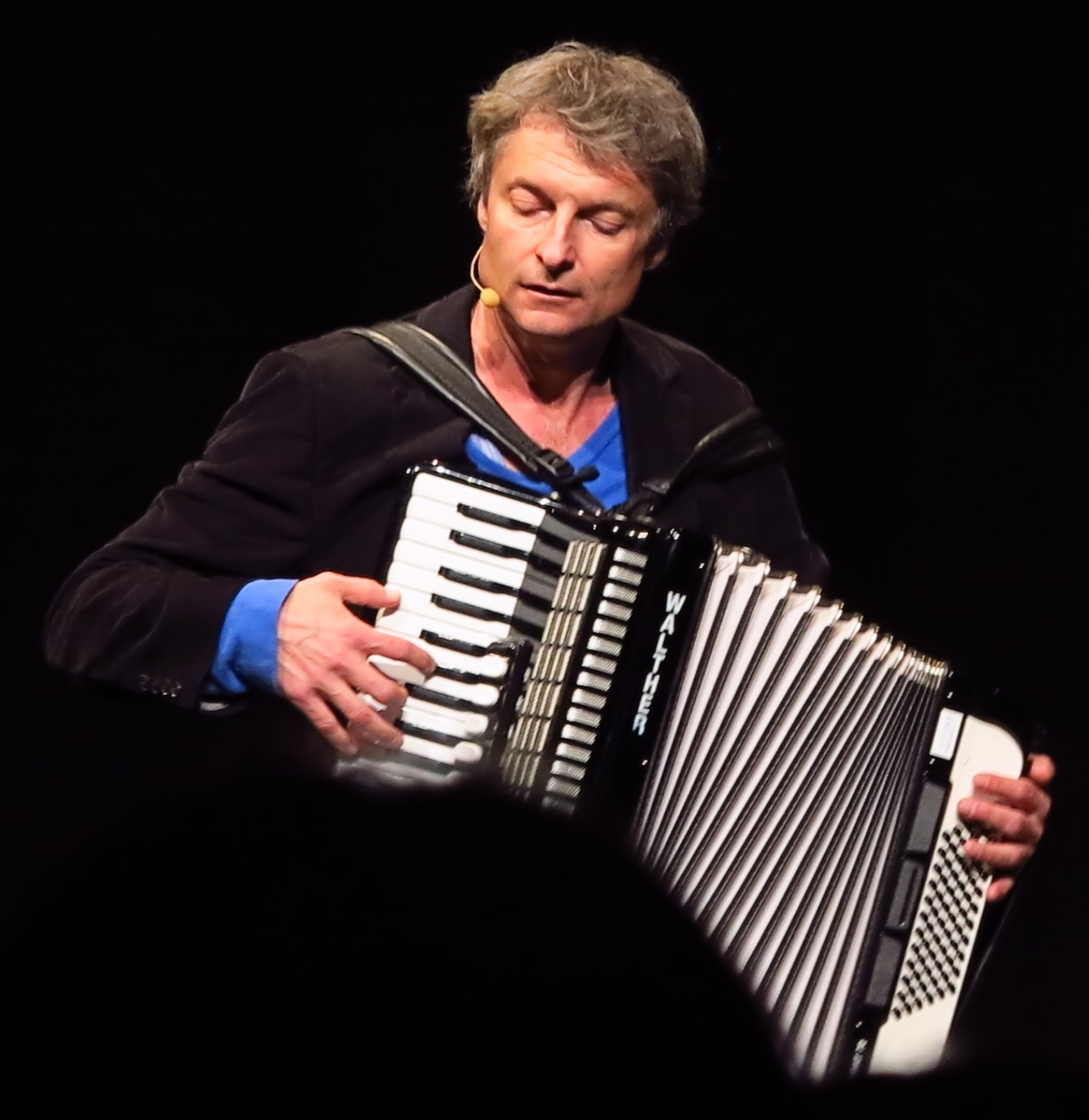 Alfred Dorfer (*1961) österreichischer Schauspieler und Kabarettist, Programm "bisjetzt", 2012-04